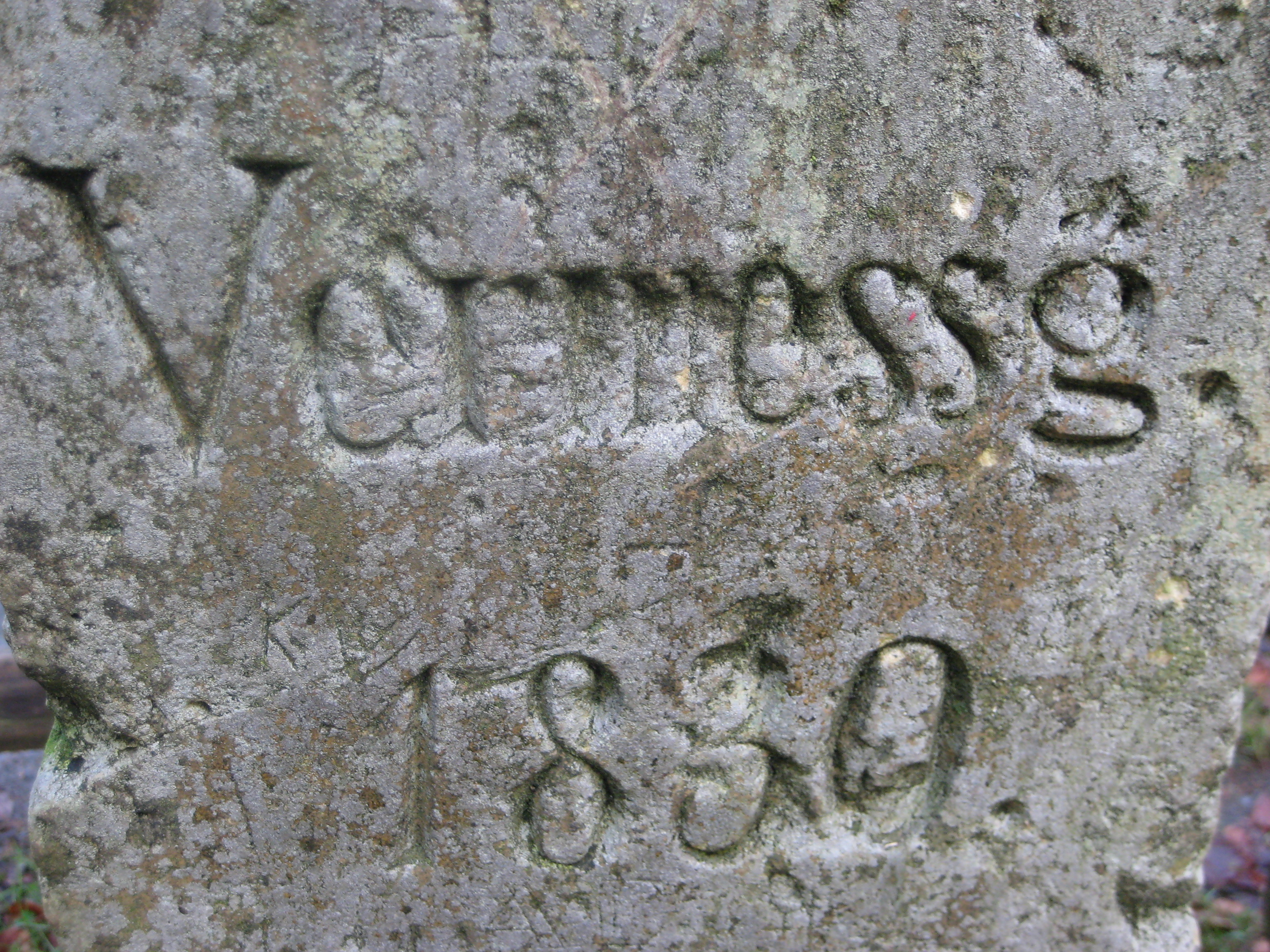 Vermessungsstein am Dörenberg